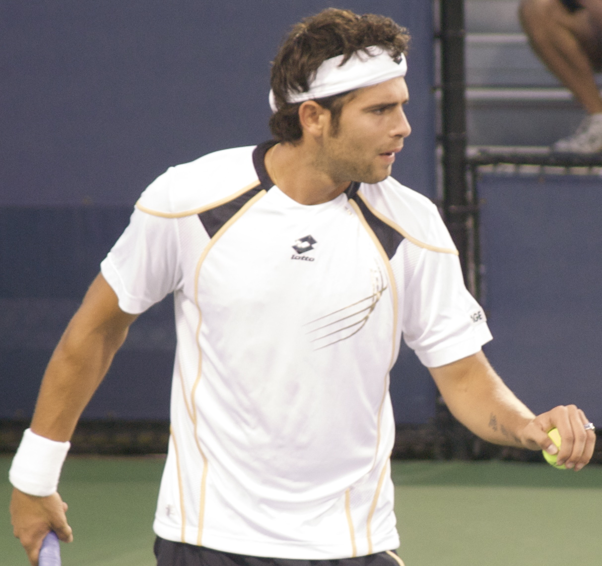 Simone Bolelli